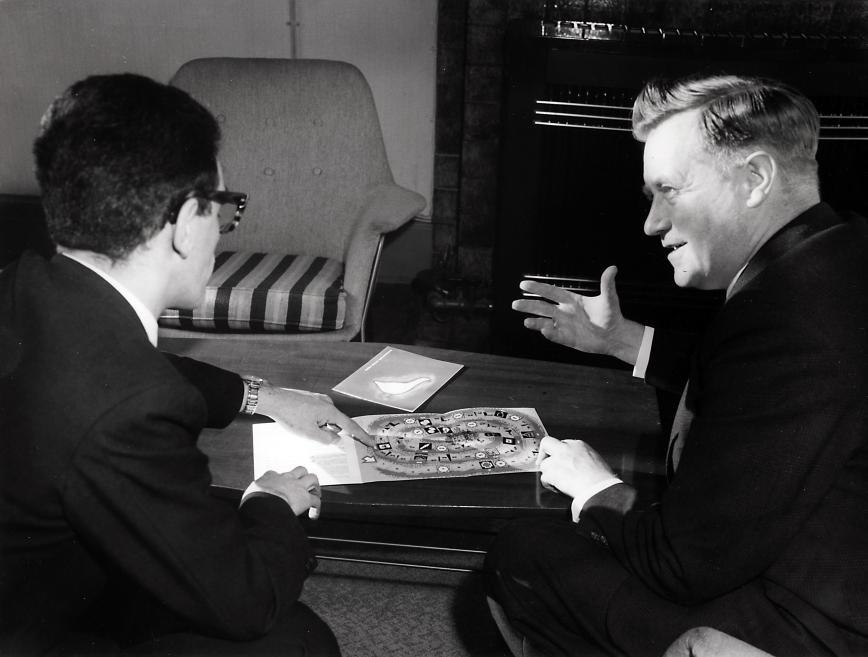 Burgemeester D. de Loor (PvdA) van Delft(rechts) en de voorlichtingsambtenaar H.J.Voorwinde. Delft, Nederland,14 november 1958.